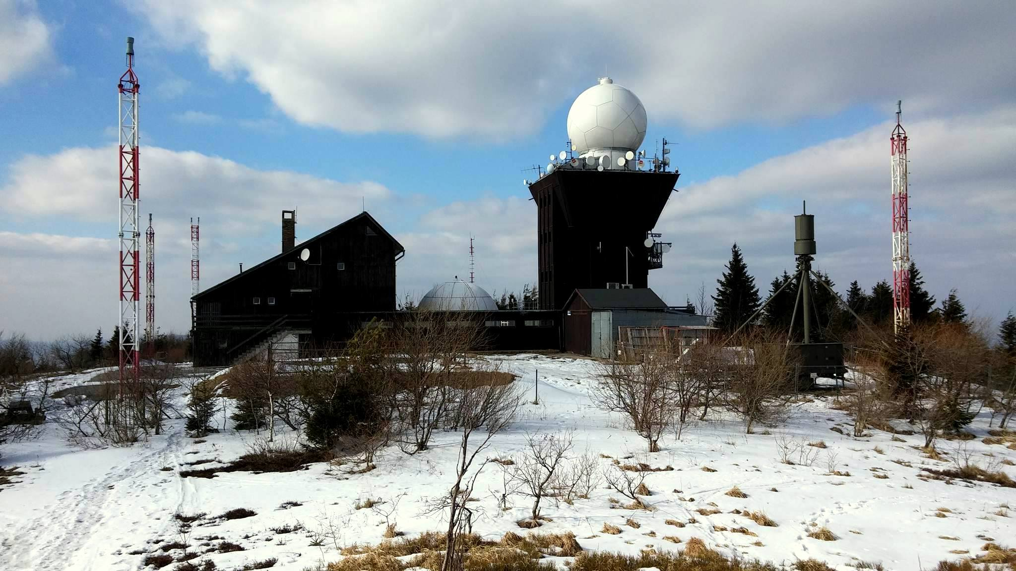 Meteorologická radarová stanica Slovenského hydrometeorologického ústavu na Kojšovskej holi.